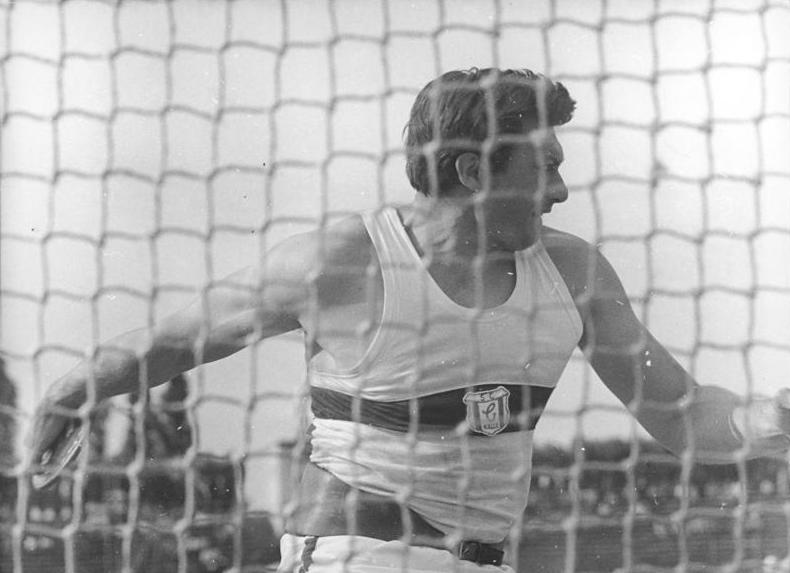 Lothar Milde Zentralbild Mittelstädt 03.08.1969 Berlin: XX. Deutsche Leichtathletik-Meisterschaften der DDR -Im Diskuswerfen verbesserte der Olympiazweite Lothar Milde (SC Chemie Halle) seinen DDR-Rekord um 28 cm auf international beachtliche 63,60 Meter. Der 33jährige war allen Konkurrenten eindeutig überlegen.